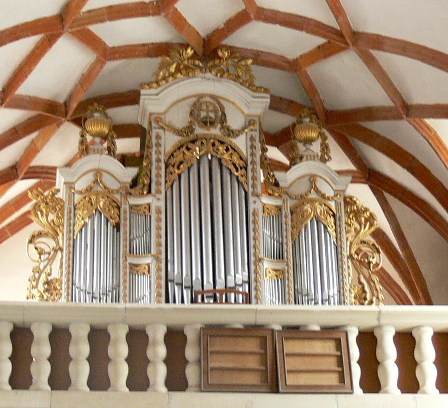 Imagina organului Prejmer